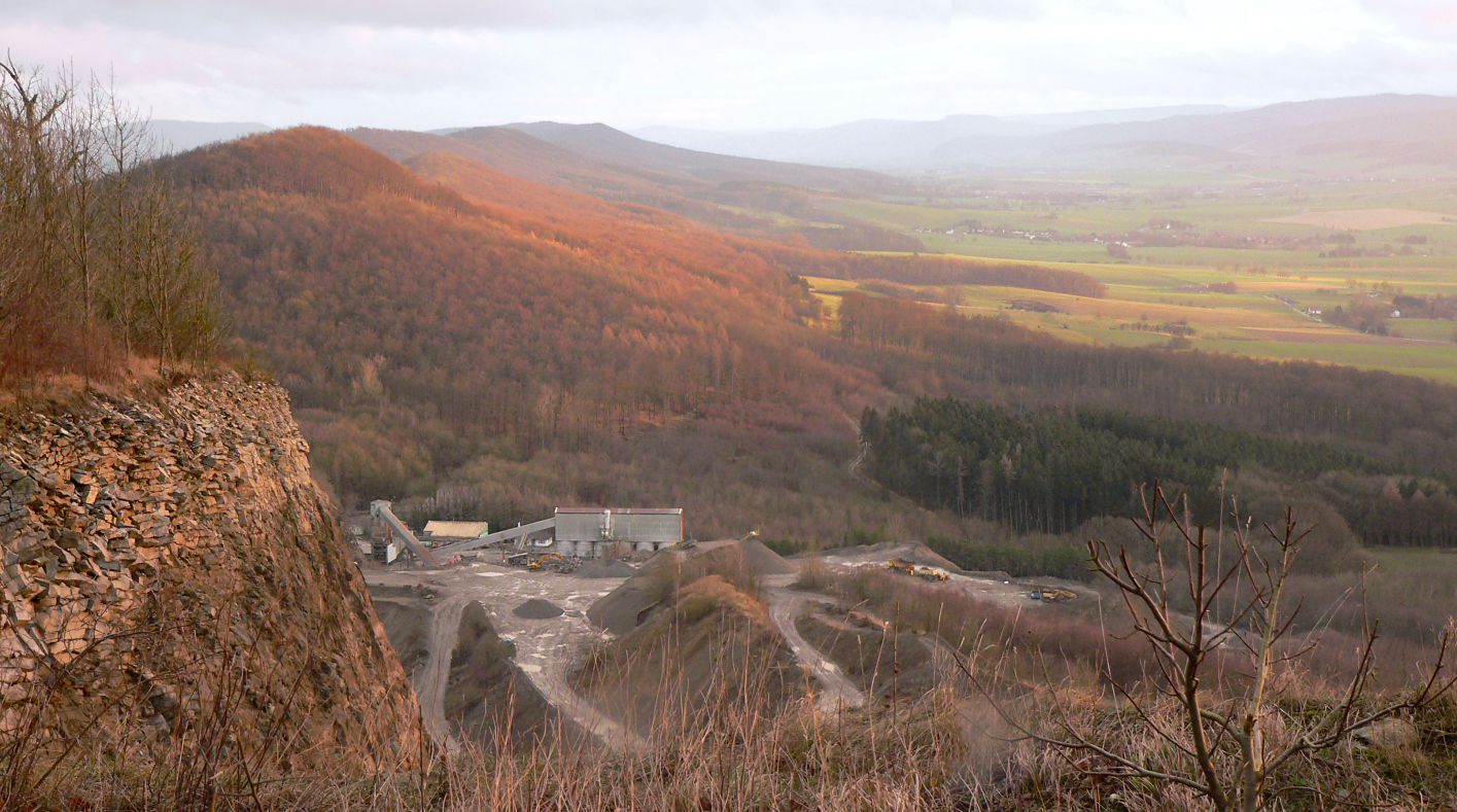 Kamm des Ith mit Steinbruch